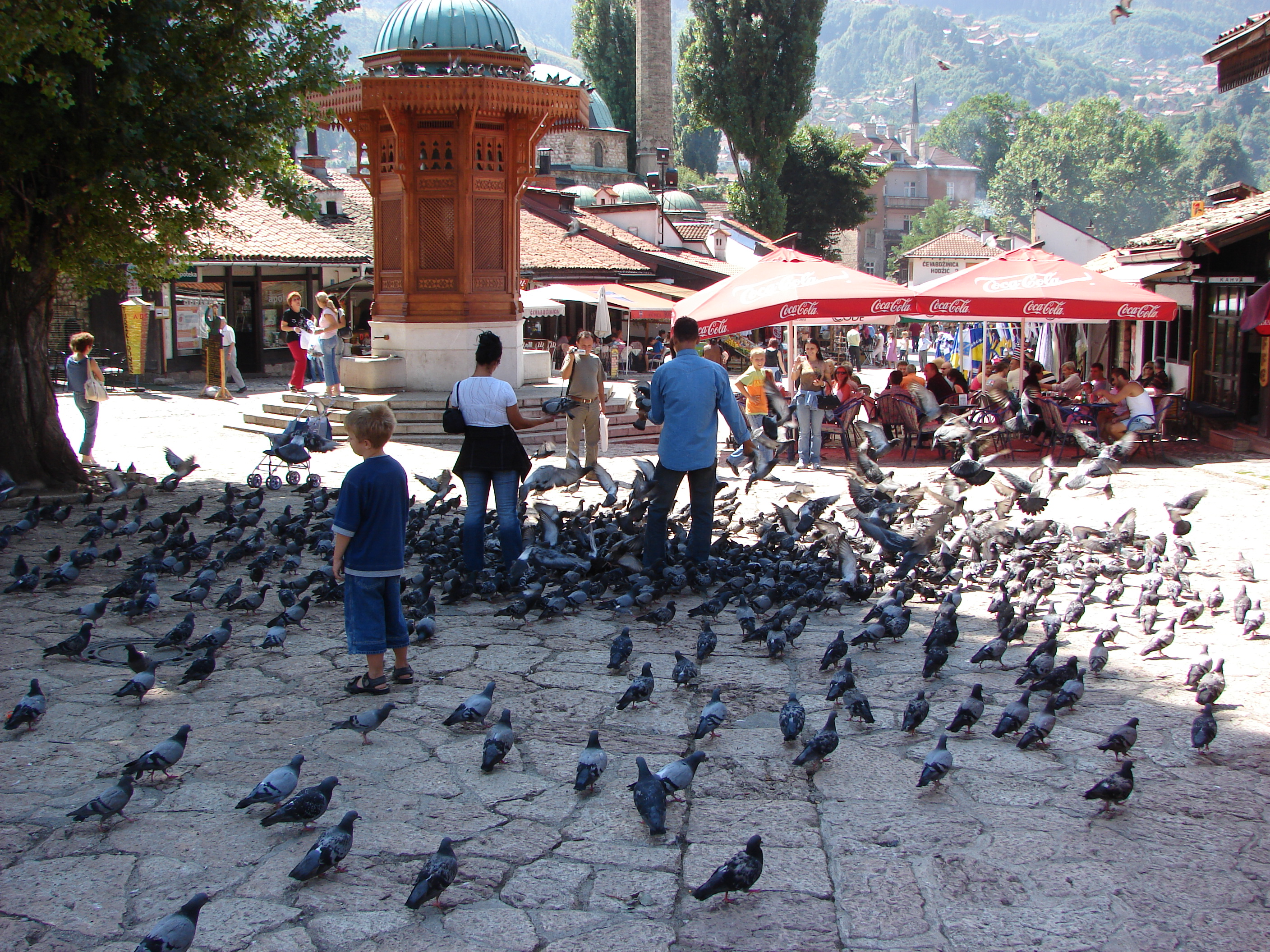 A picture of Baščaršija in 2006